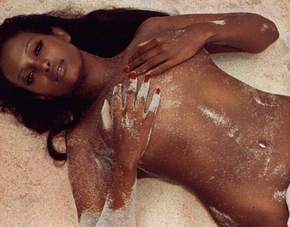 Zeudi Araya , Screenshot del film La ragazza dalla pelle di luna di Luigi Scattini. Catturato dal DVD della Criterion da Antonio la trippa. Software utilizzato:Asus DVD